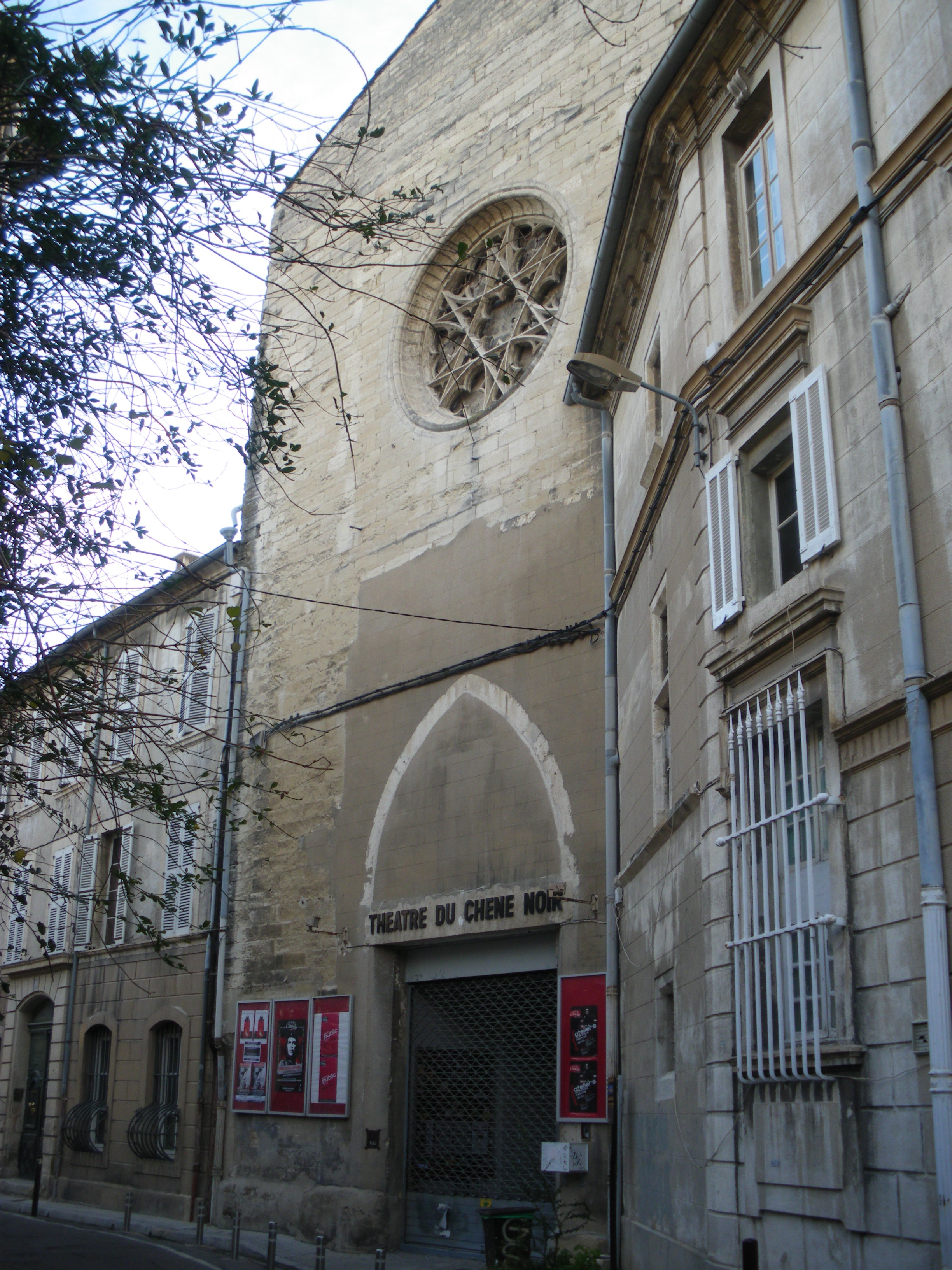 Théatre du Chêne Noir à Avignon